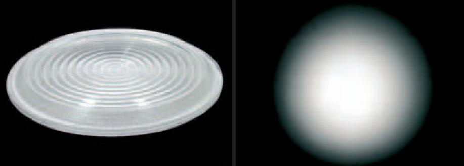 Lentille PC Fresnel --Bensti (d) 25 mars 2008 à 22:32 (CET)